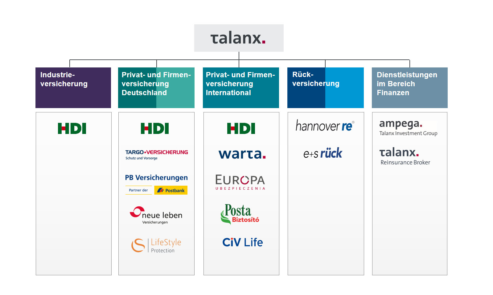 Geschäftsbereiche der Talanx AG